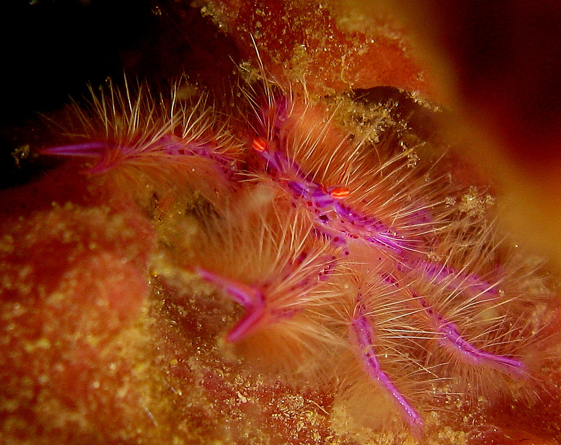 Lauriea siagiani